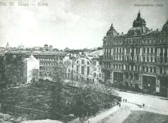 Будинок "Київський Париж": Будинок на вул городецького 9 (збудований в 1901 році)